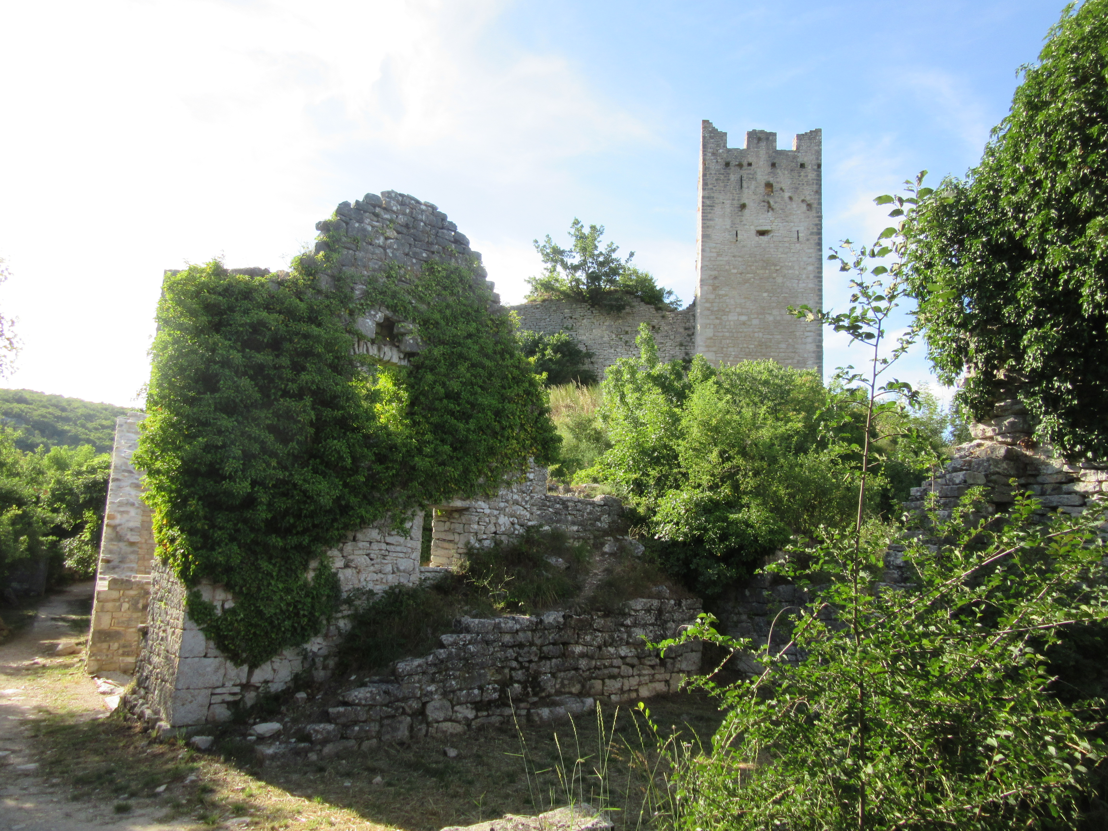 Ruševine srednjovjekovnog grada Dvigrada